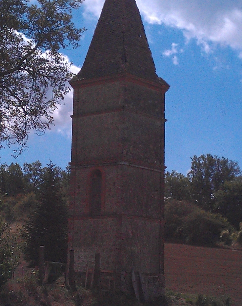 Photo (mal cadrée et à contre-jour) du Pigeonnier de Montplaisir, l'un des plus hauts du Tarn (propriété privée) - (Inscrit, 2010) .